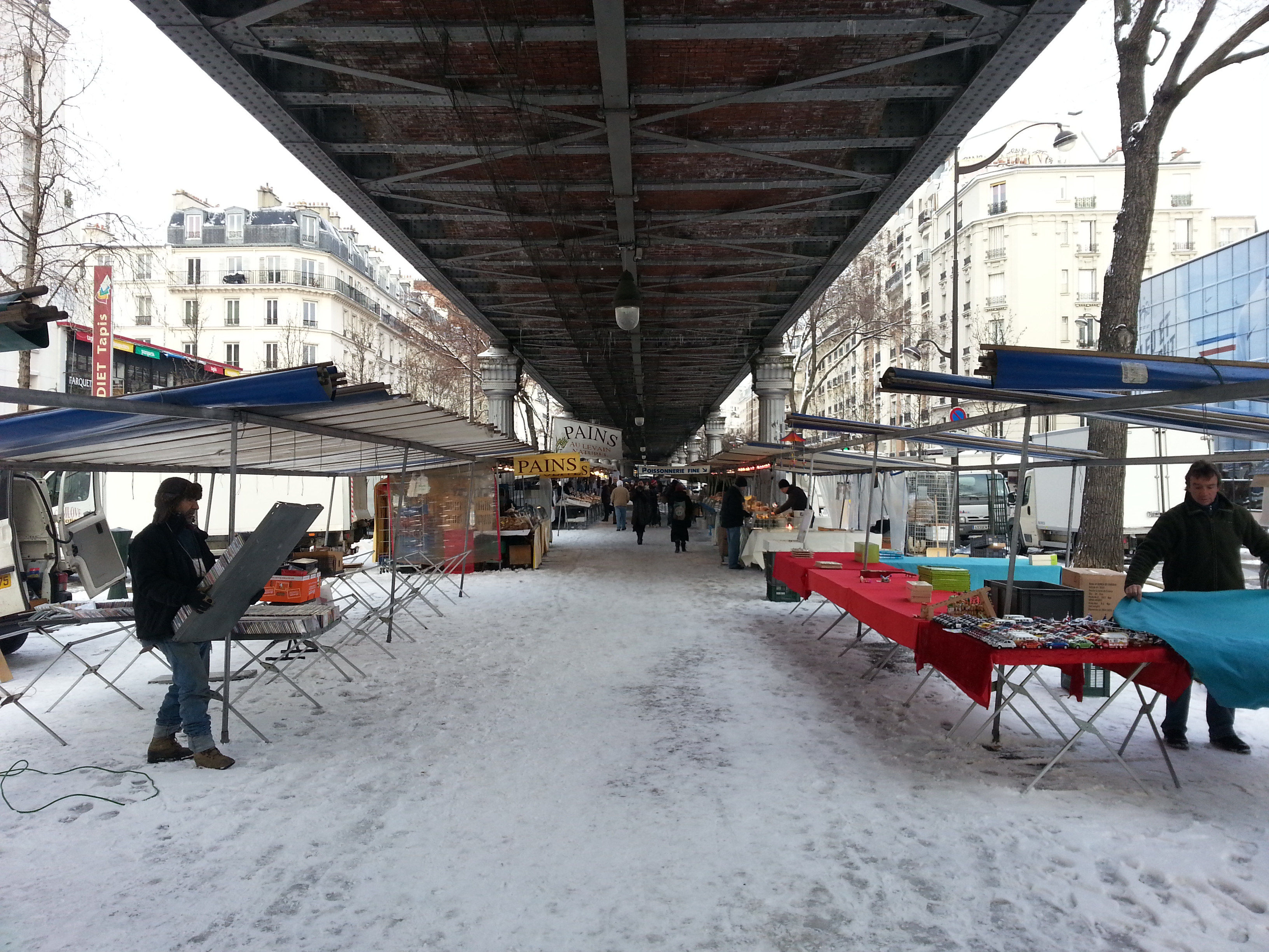 Installation du marché de Grenelle après une journée de neige (exceptionel pour mi-mars). Nombreux sont les marchands qui n'ont pas pu venir à cause des routes verglacées. La photo est prise juste en face de la Fédération Française de Football.